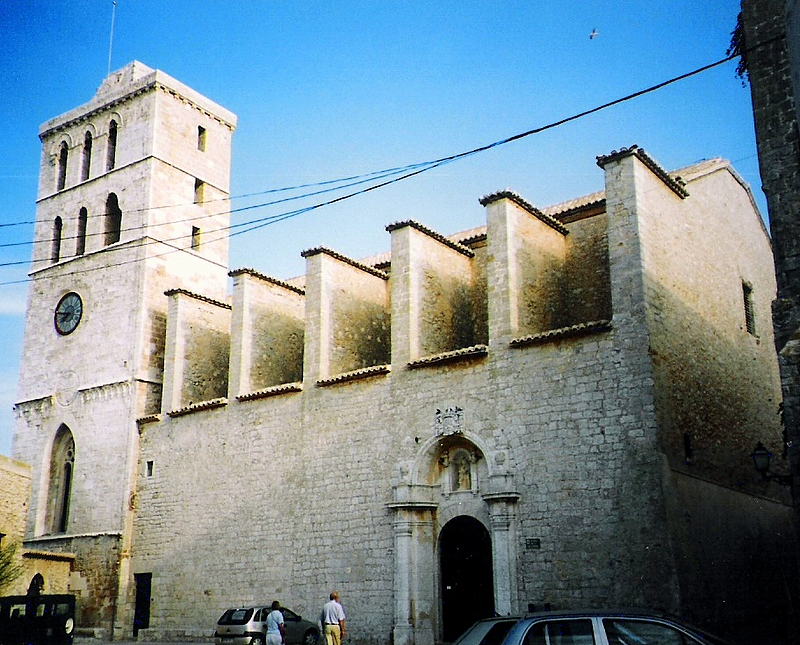 Catedral d'Eivissa, a Dalt Vila.